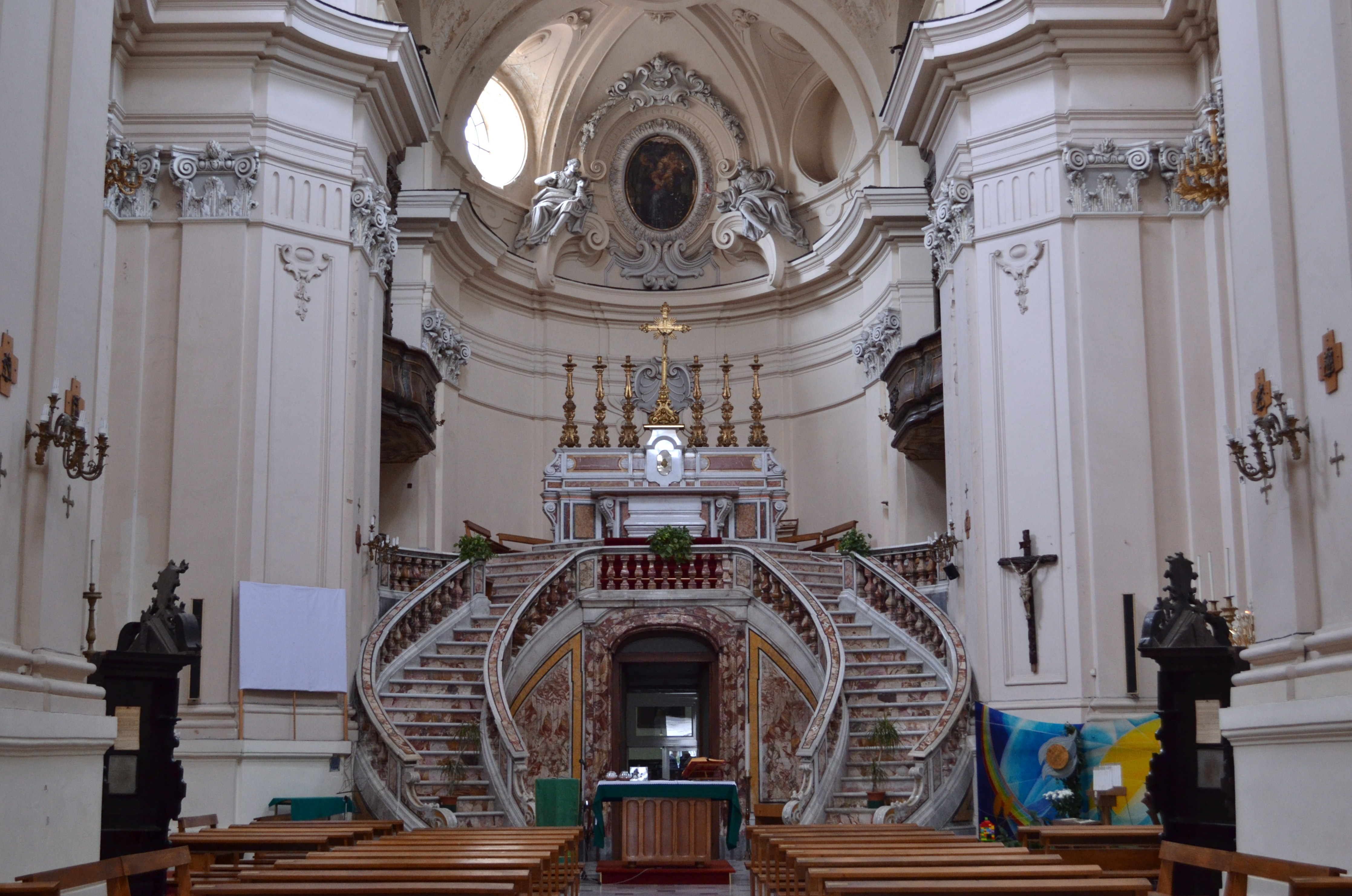 Napoli. Borgo Sant'Antonio Abate.